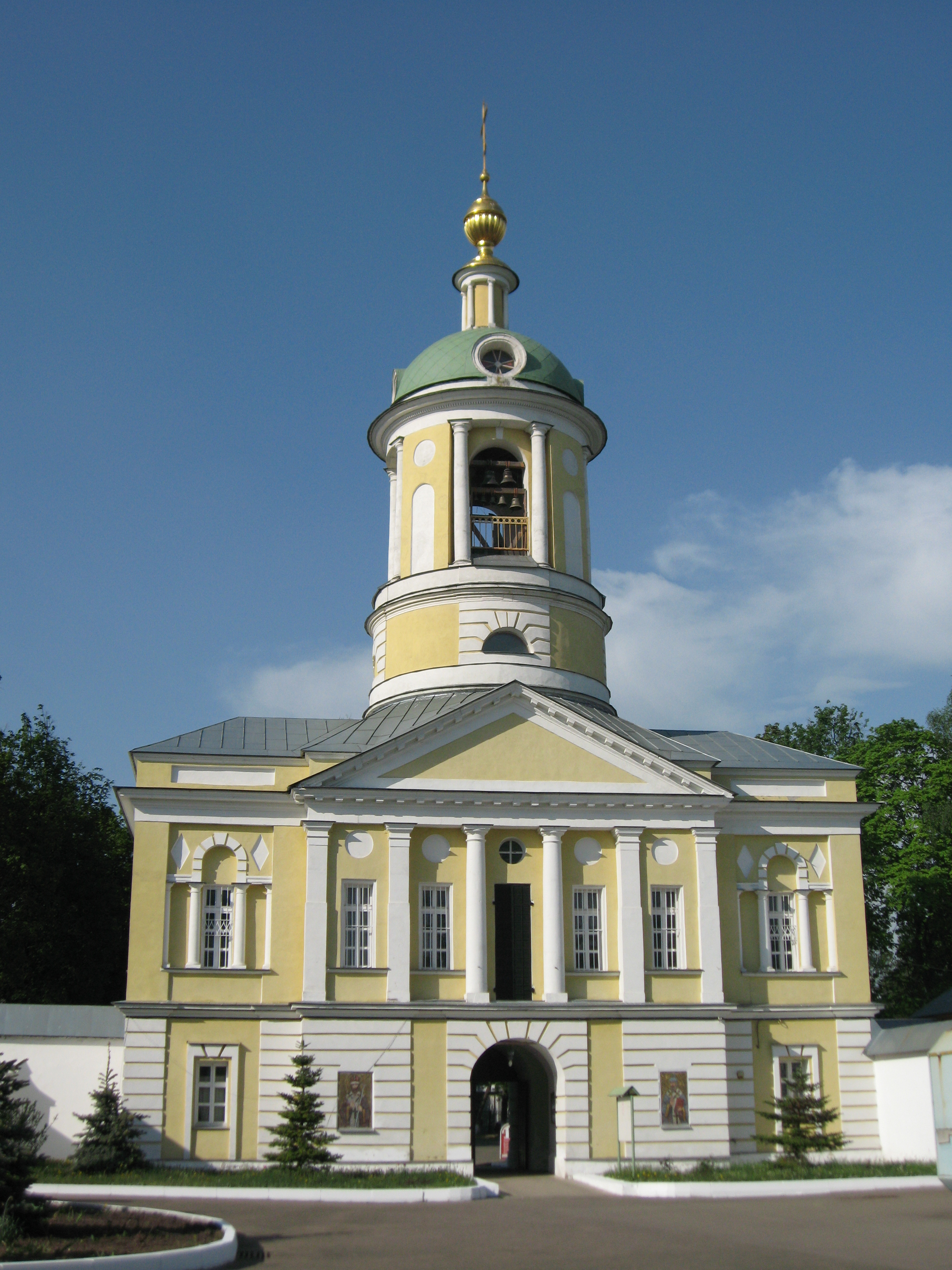 Церковь Димитрия Ростовского (надвратная) (Москва и Московская область, Ленинск, Петровский проезд)